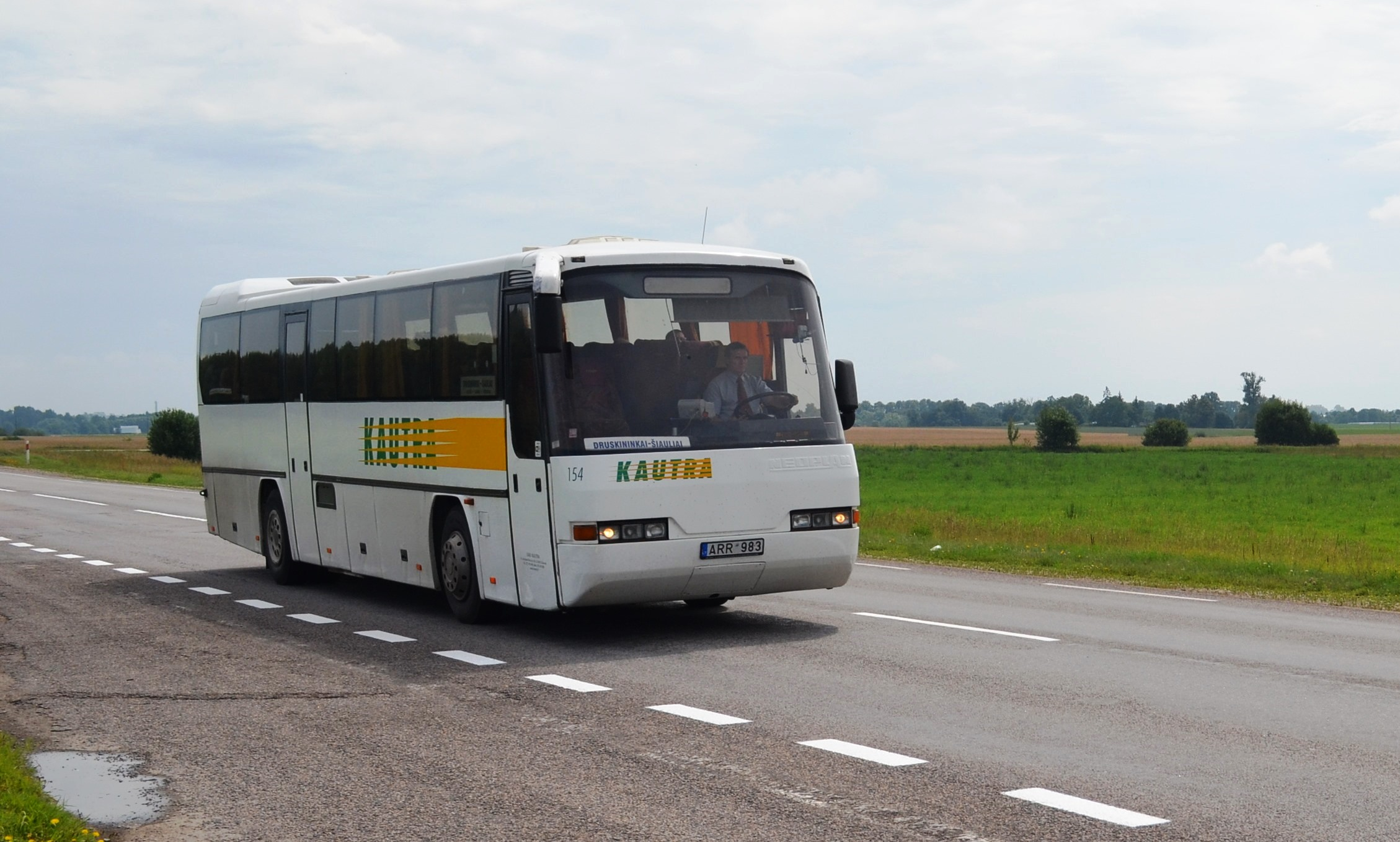 "Kautra" autobusas maršrute "Druskininkai-Šiauliai" Kėdainių raj., prie Ruminių k.